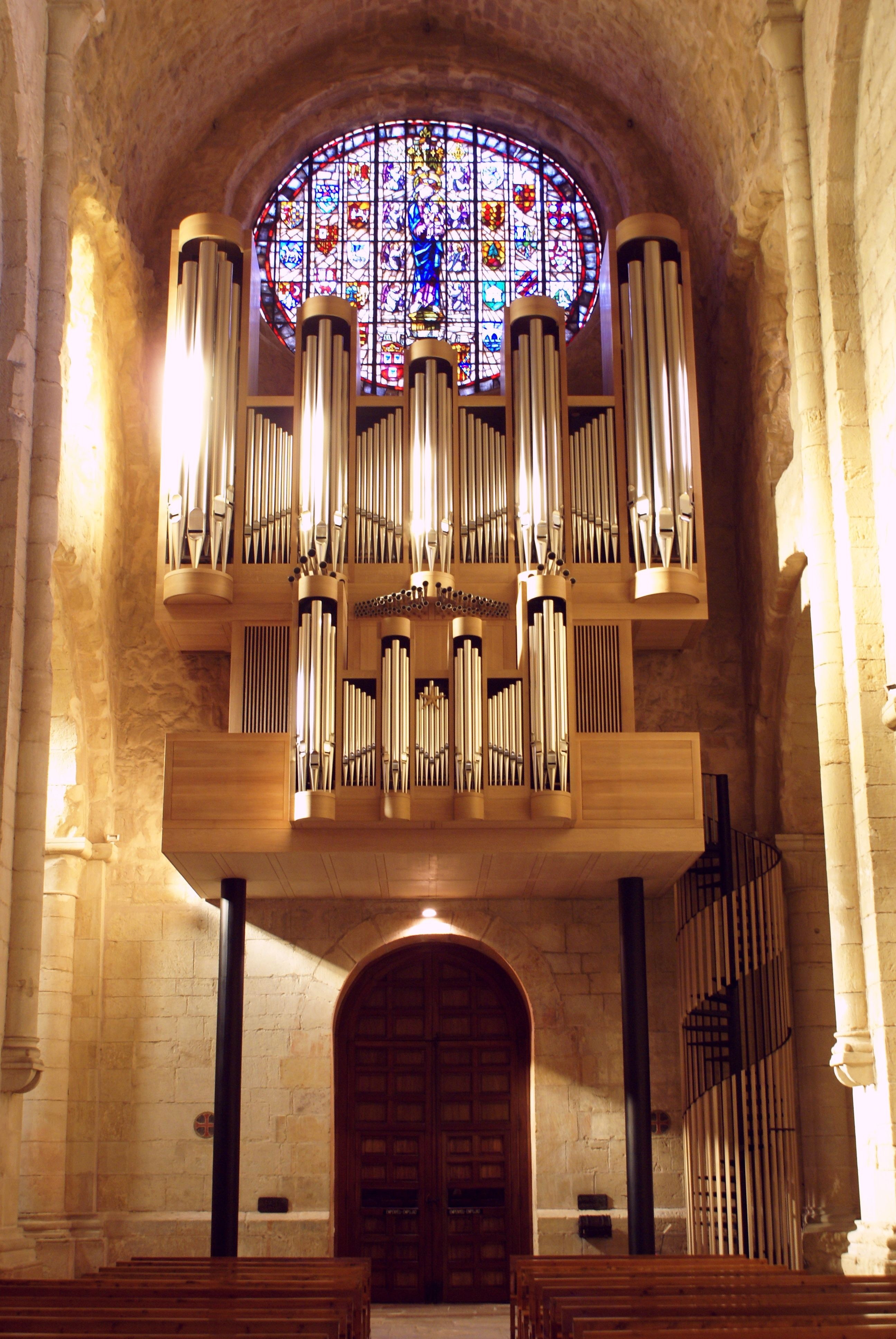 El nou orgue de Poblet (2012), al fons de l'església abacial.